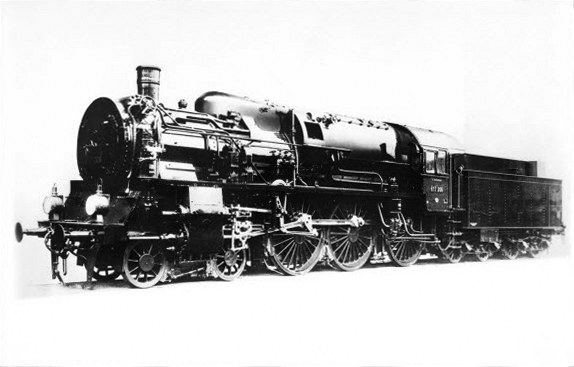 Ansichtskarte der deutschen Hochdrucklokomotive H17 206